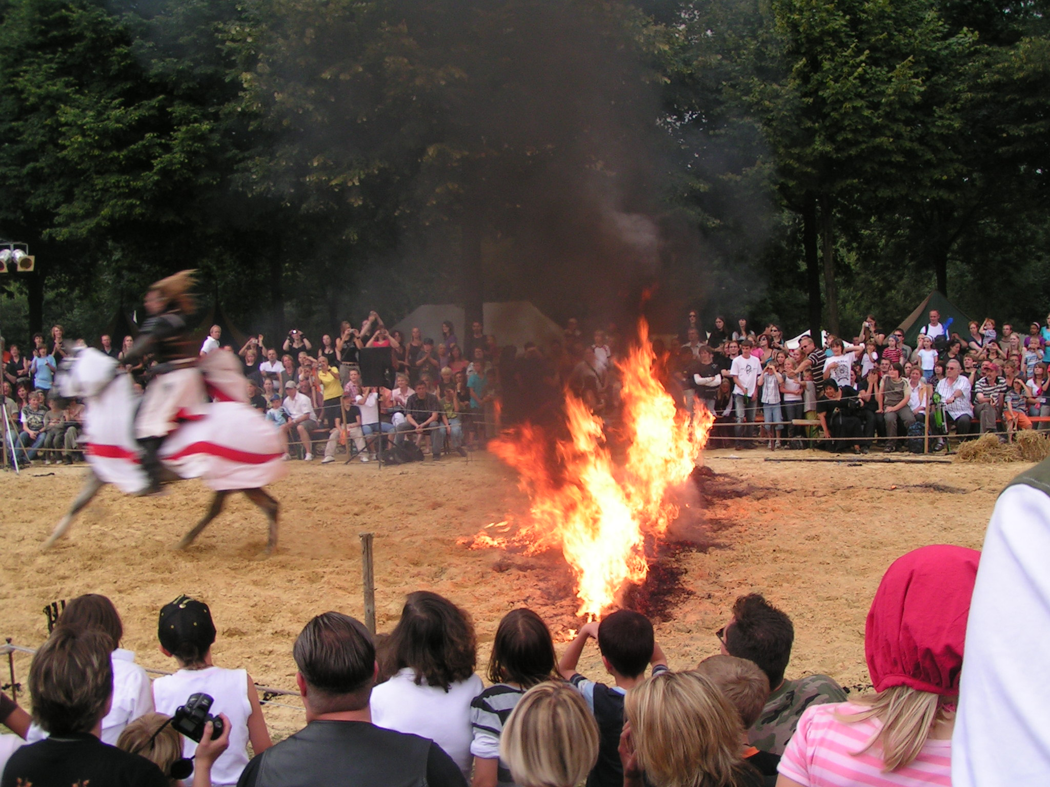 Mittelalterspiele in Telgte